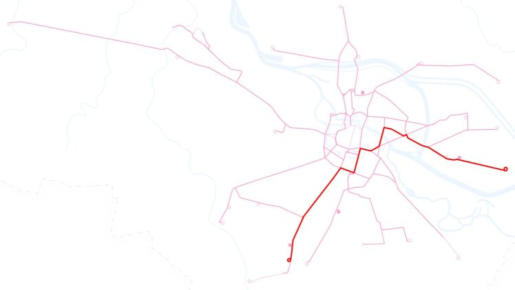 Poglądowa mapka przebiegu linii tramwajowej 2 we Wrocławiu.